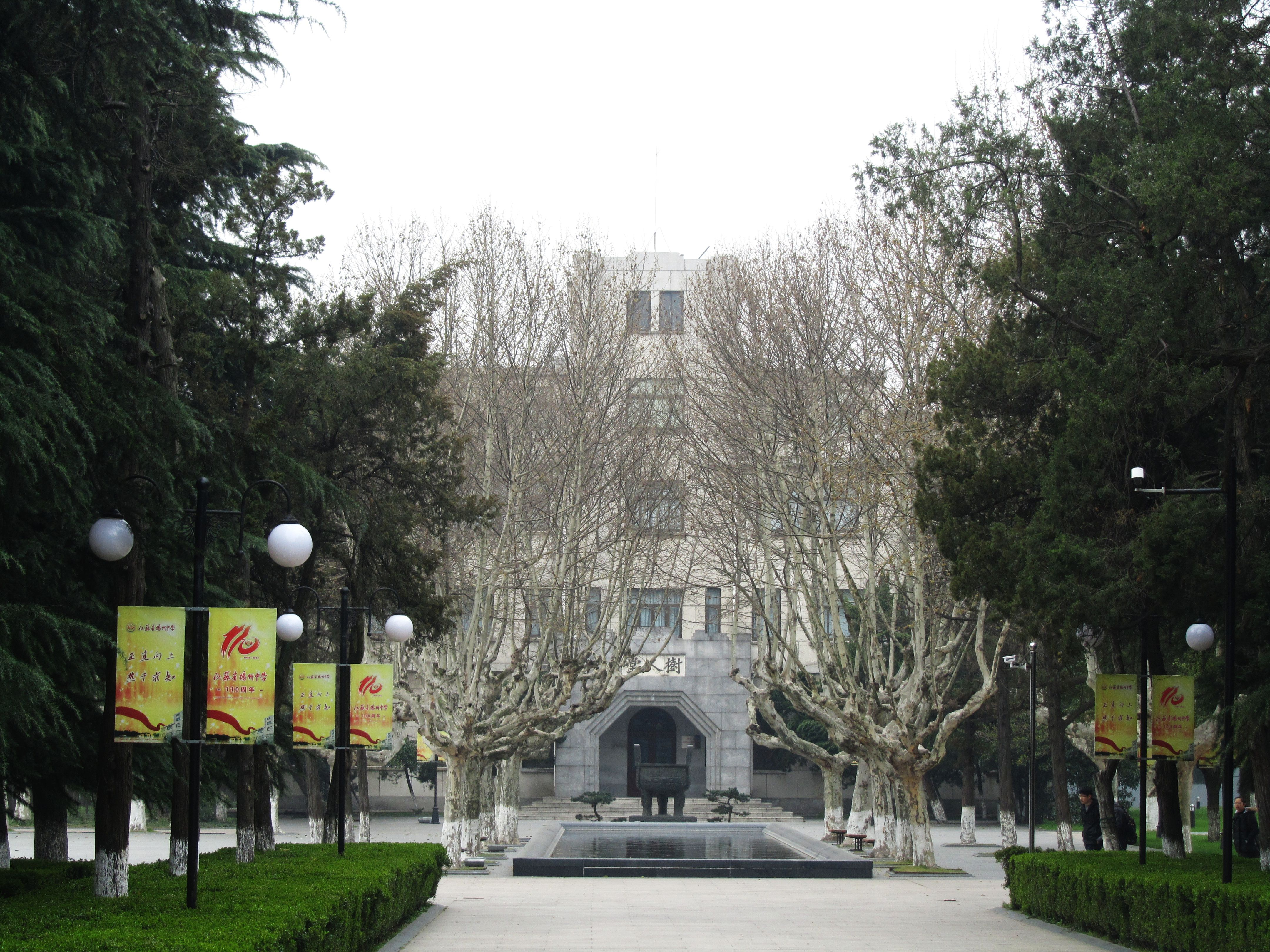 江苏省扬州中学内的树人堂。